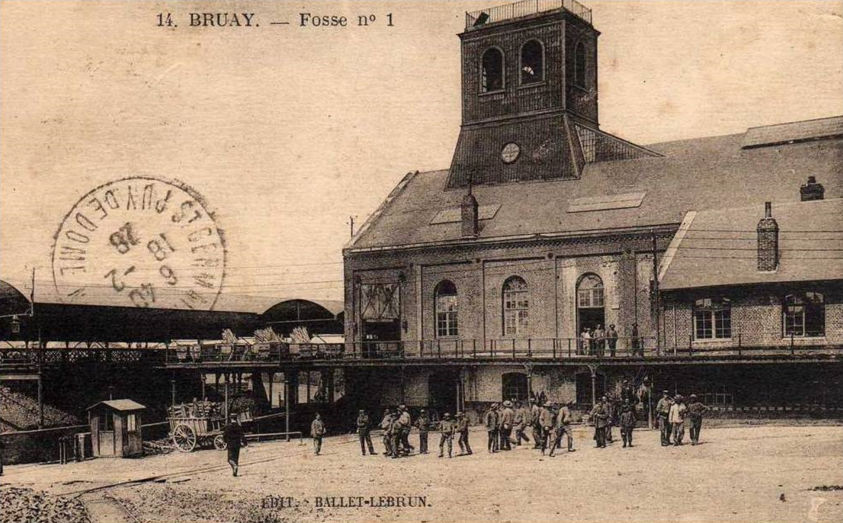 La Fosse n° 1 - 1 bis de la Compagnie des mines de Bruay était un charbonnage constitué de deux puits situé à Bruay-la-Buissière, Pas-de-Calais, Nord-Pas-de-Calais, France.